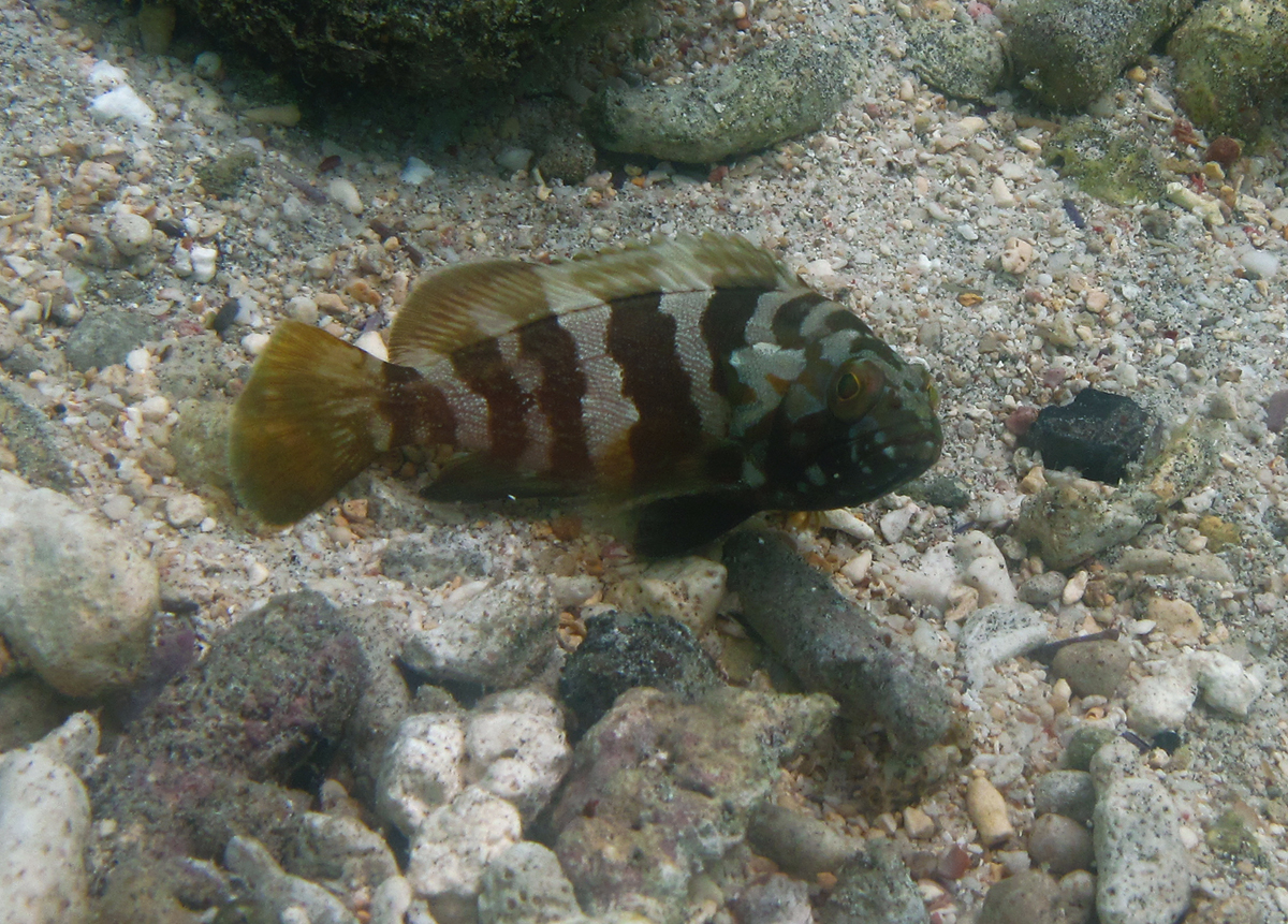 Un mérou juvénile, sans doute Epinephelus rivulatus à la Réunion.